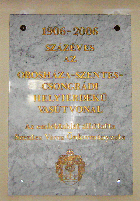 A szentesi vasútállomás emléktáblája a Szentes-Orosháza vasútvonal megnyitása 100. évfordulójának emlékére (1906-2006) Pataki Márta felvétele